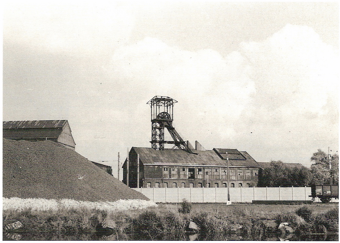 La Fosse n° 3 de la Compagnie des mines de l'Escarpelle était un charbonnage constitué d'un seul puits situé à Flers-en-Escrebieux, Nord, Nord-Pas-de-Calais, France.